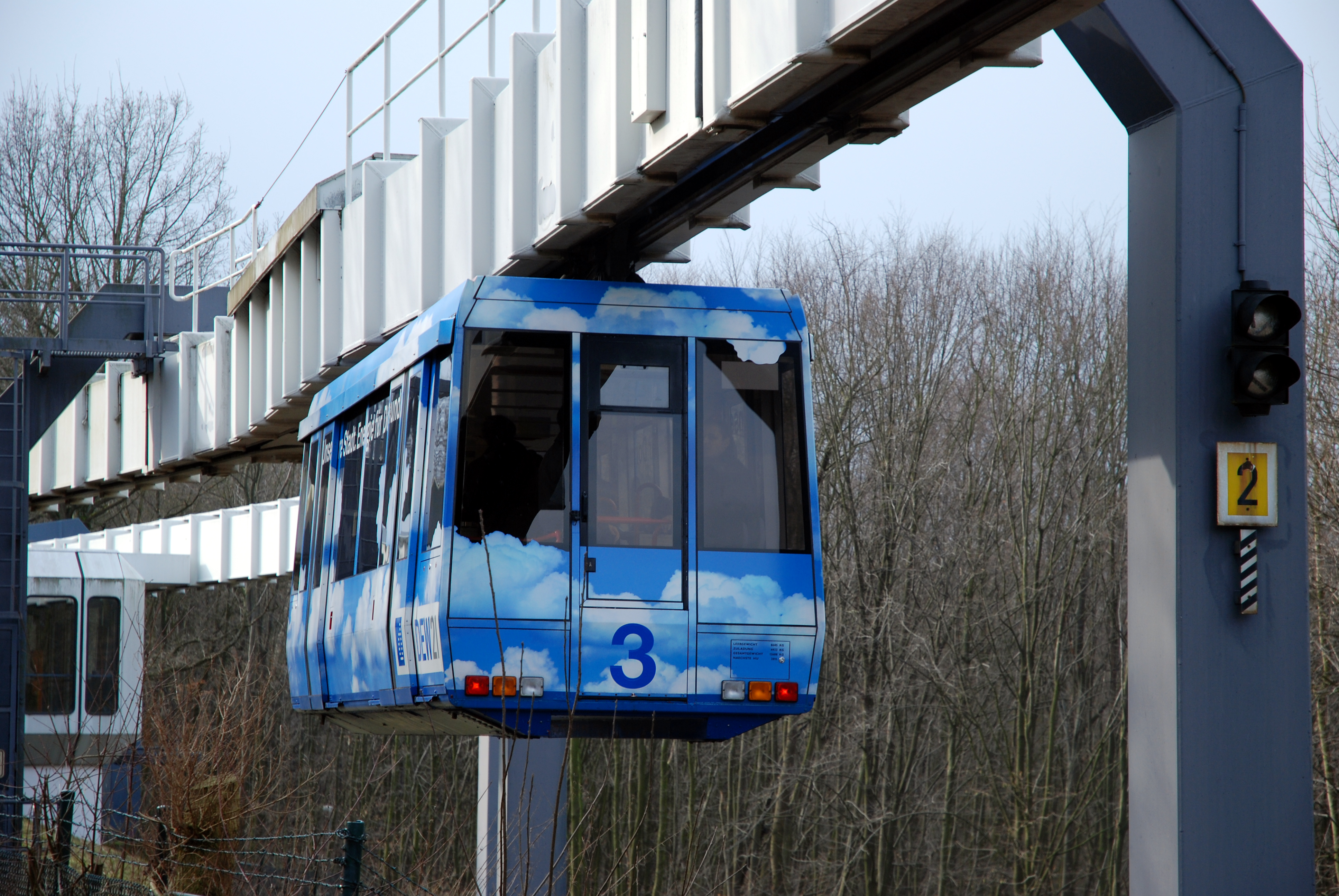 Dortmund-Eichlinghofen, TU Dortmund, Campus Süd, H-Bahn